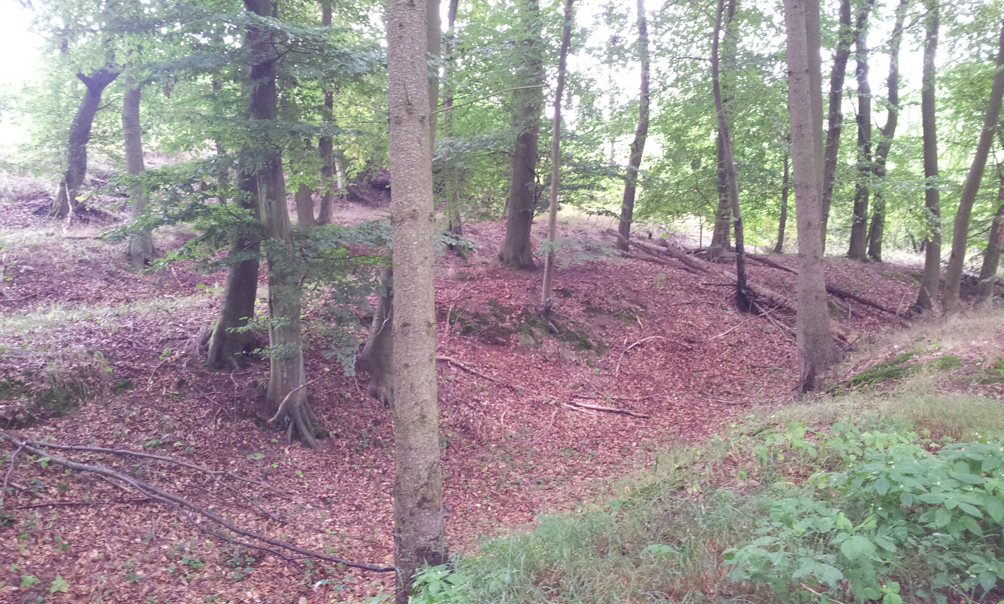 Obwohl nahezu schon ein Jahrtausend seit ihrer Entstehung vergangen sind, kann man die einstigen Wälle der Eisernen Pforte auch heute noch recht gut erkennen.